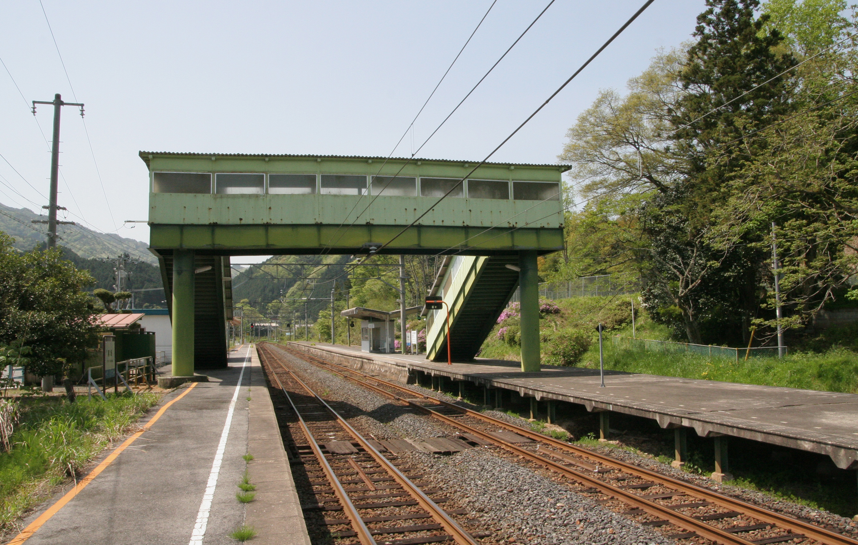 黒坂駅の構内